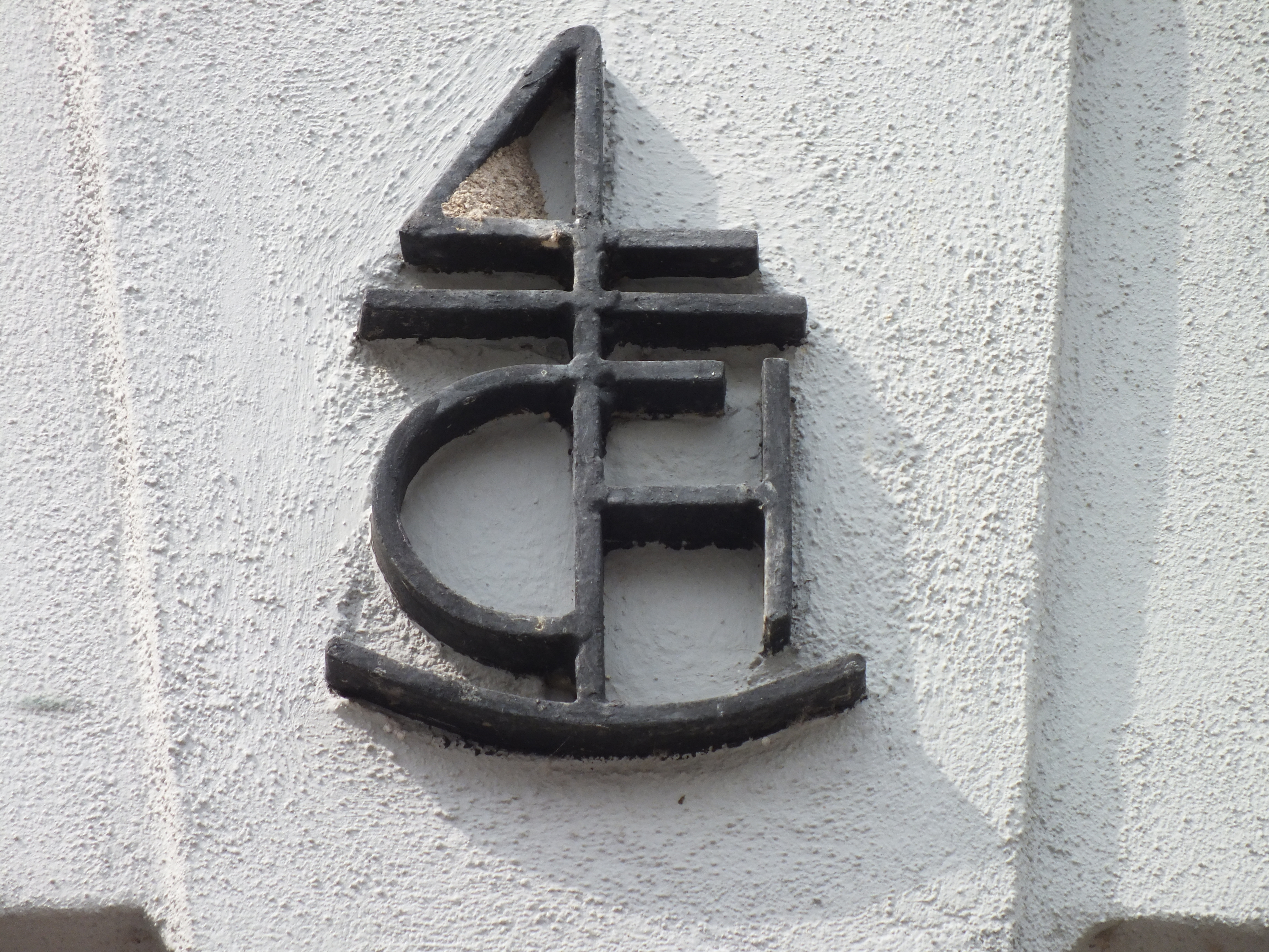 Bierquelle in Schlettau